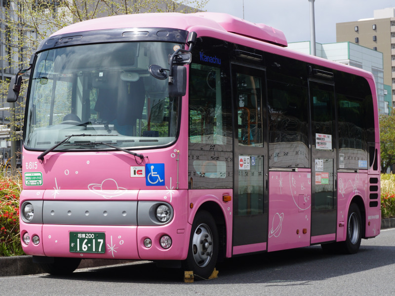 大野北地区コミュニティバス（も615）（神奈川県相模原市中央区、待機中のJR相模原駅北口にて）